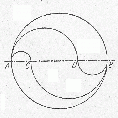 Pelecoide (esempio) Categoria:Geometria